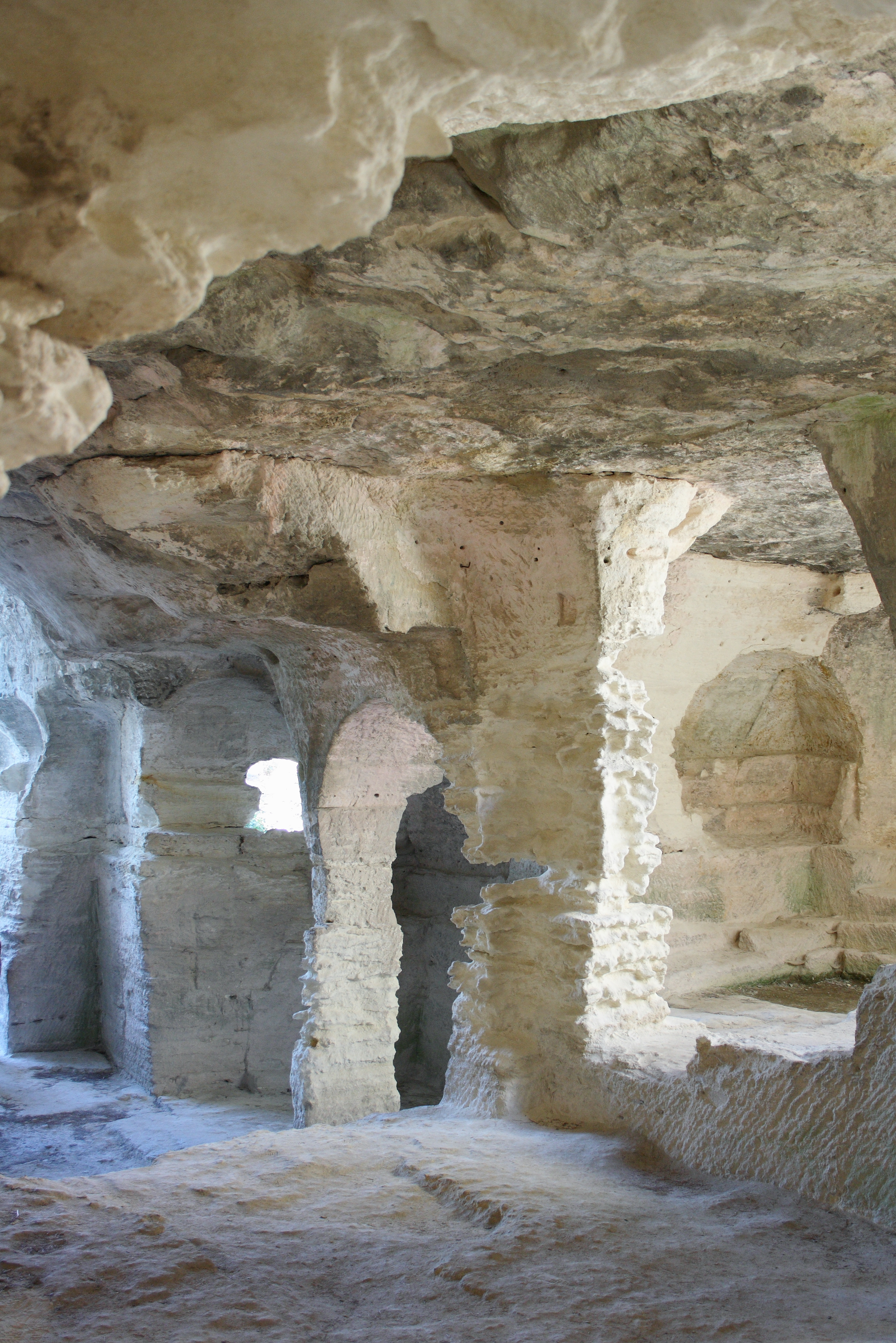 Höhlenkloster Saint-Roman bei Beaucaire, einer Gemeinde im Département Gard in der französischen Region Languedoc-Roussillon